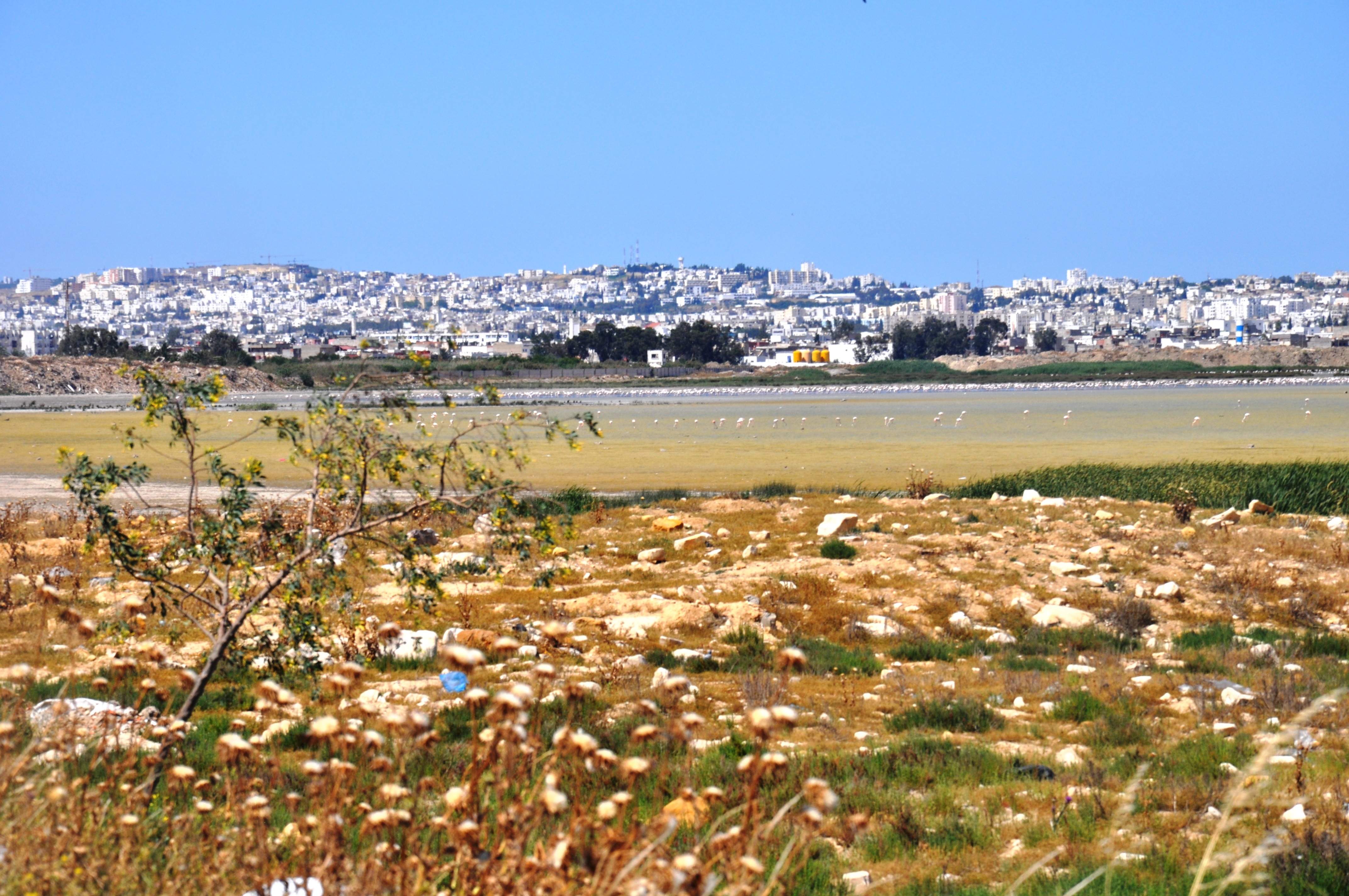 Sebkhet sedjoumi vue de la partie ouest